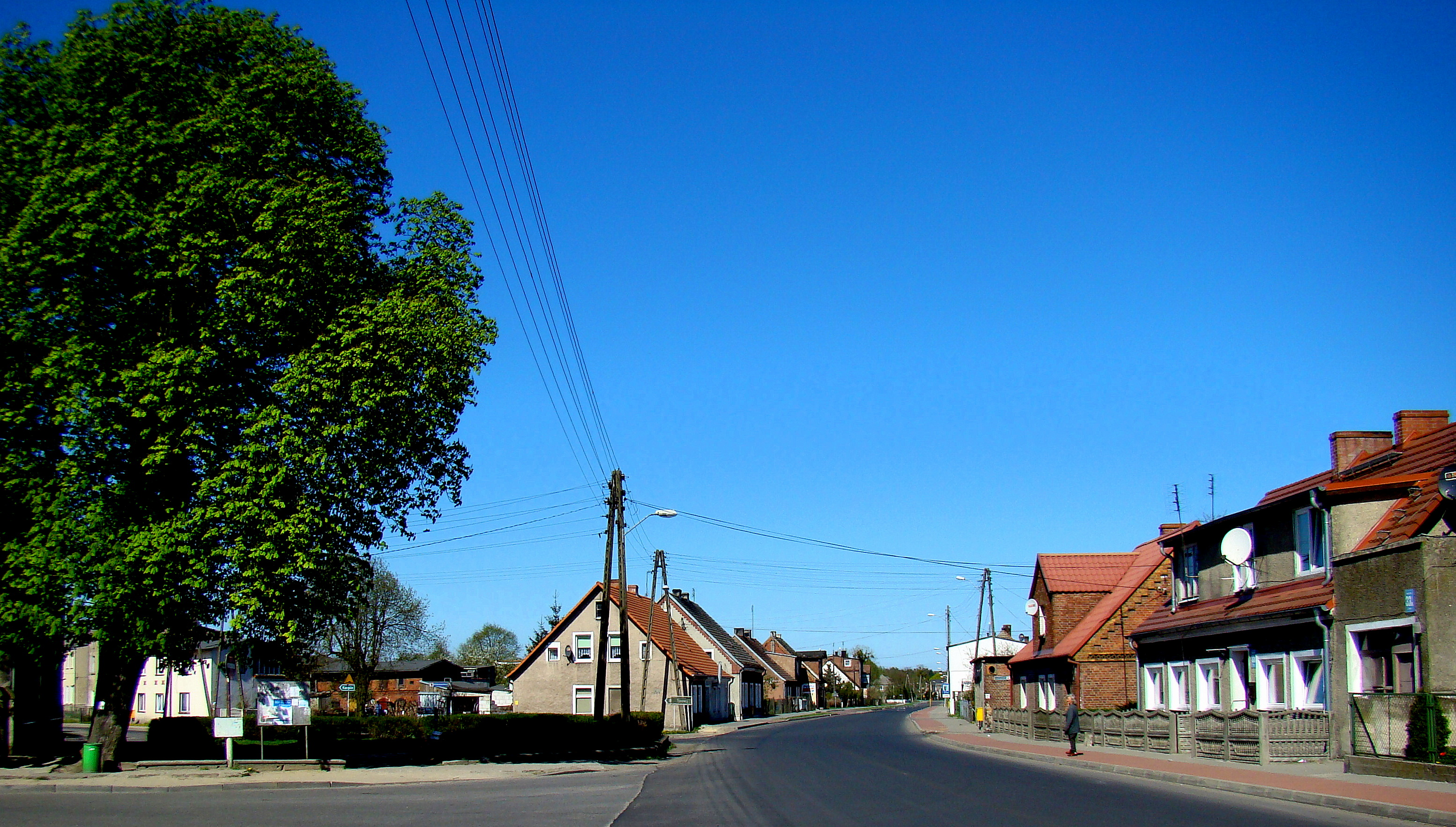 Jasienica, osiedle Polic , (Police, Województwo zachodniopomorskie), Polska